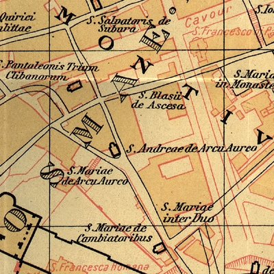 Pianta di Christian Hülsen